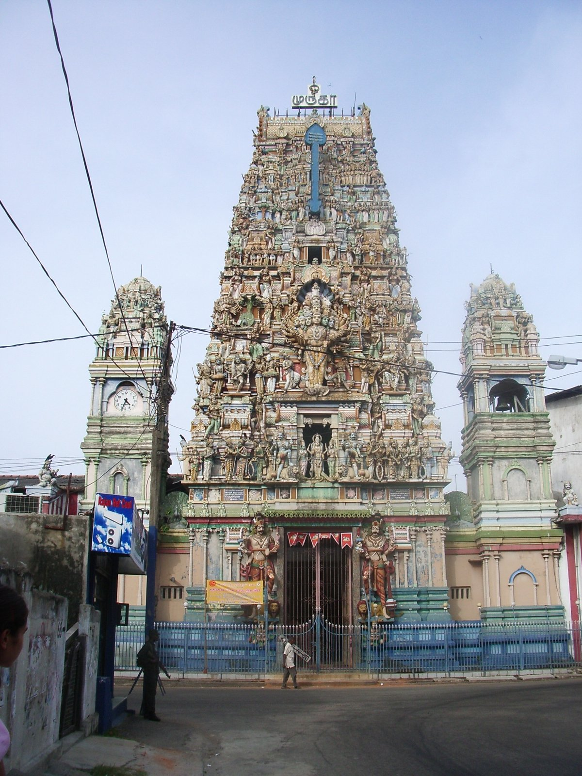 Temple a Colombo, imatge feta per J. Olle el juliol del 2006